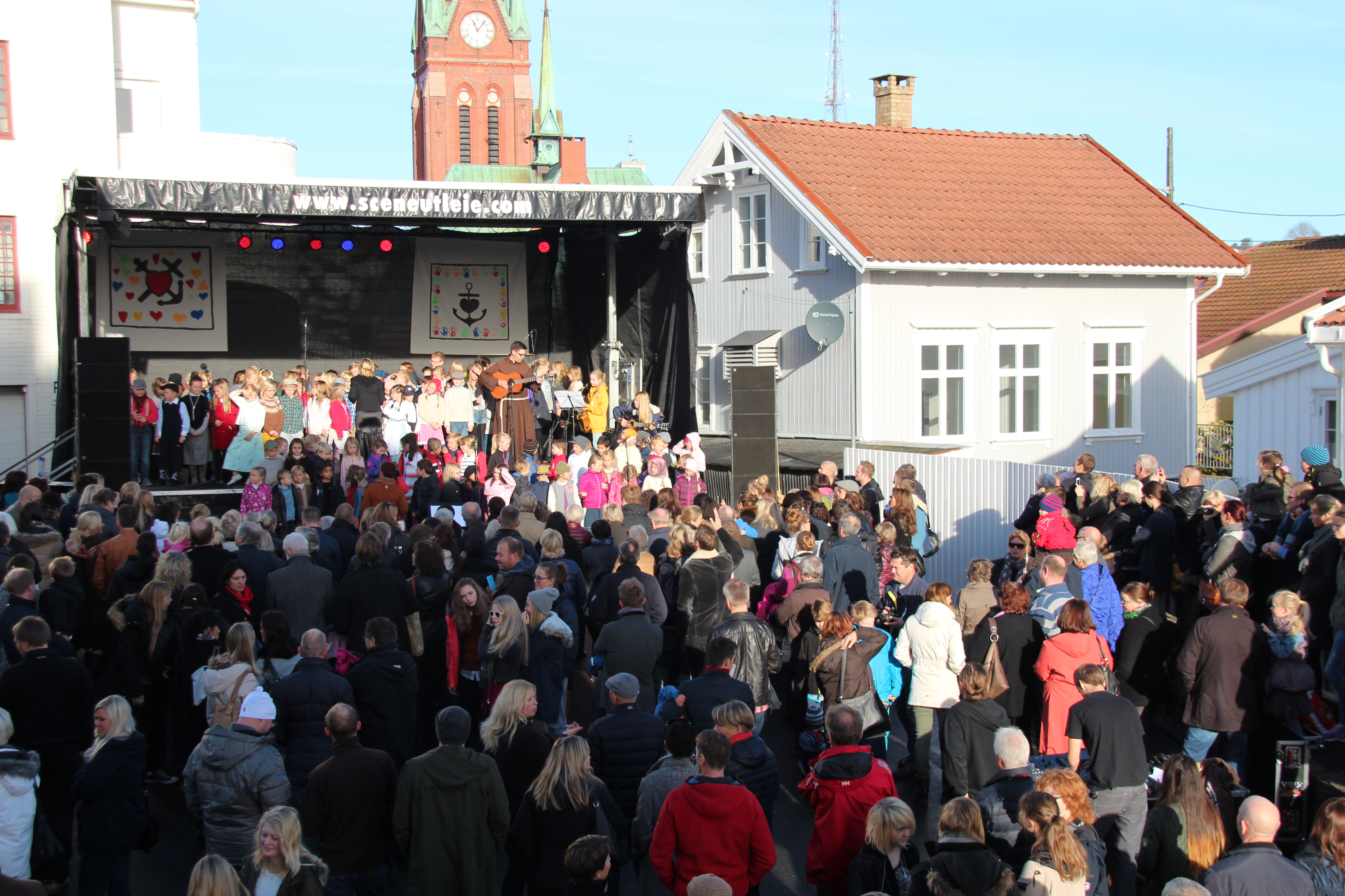 I forbindelse med skolens 100 års jubileum ble det satt opp en stor scene i skolegården hvor elevene underholdt. Bildet er fra åpen dag 02.11.13. Foto: Jan-Erik Løken